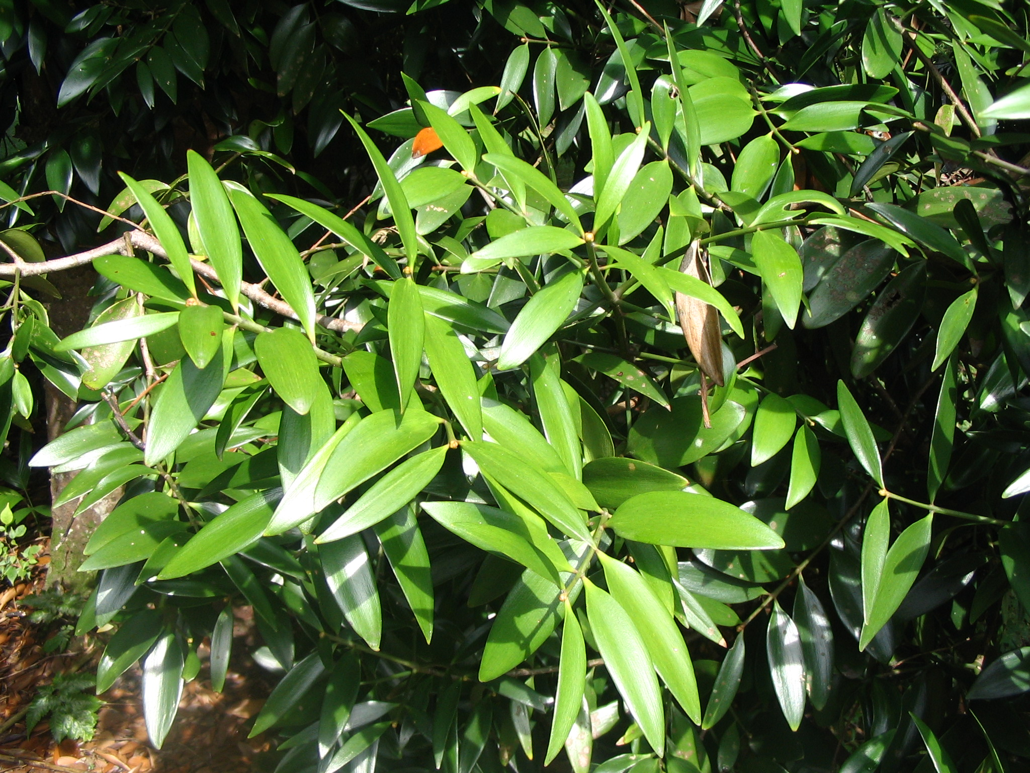 Agathis borneensis - Feuilles . Forest Research Institute of Malaysia - Kepong - Malaisie